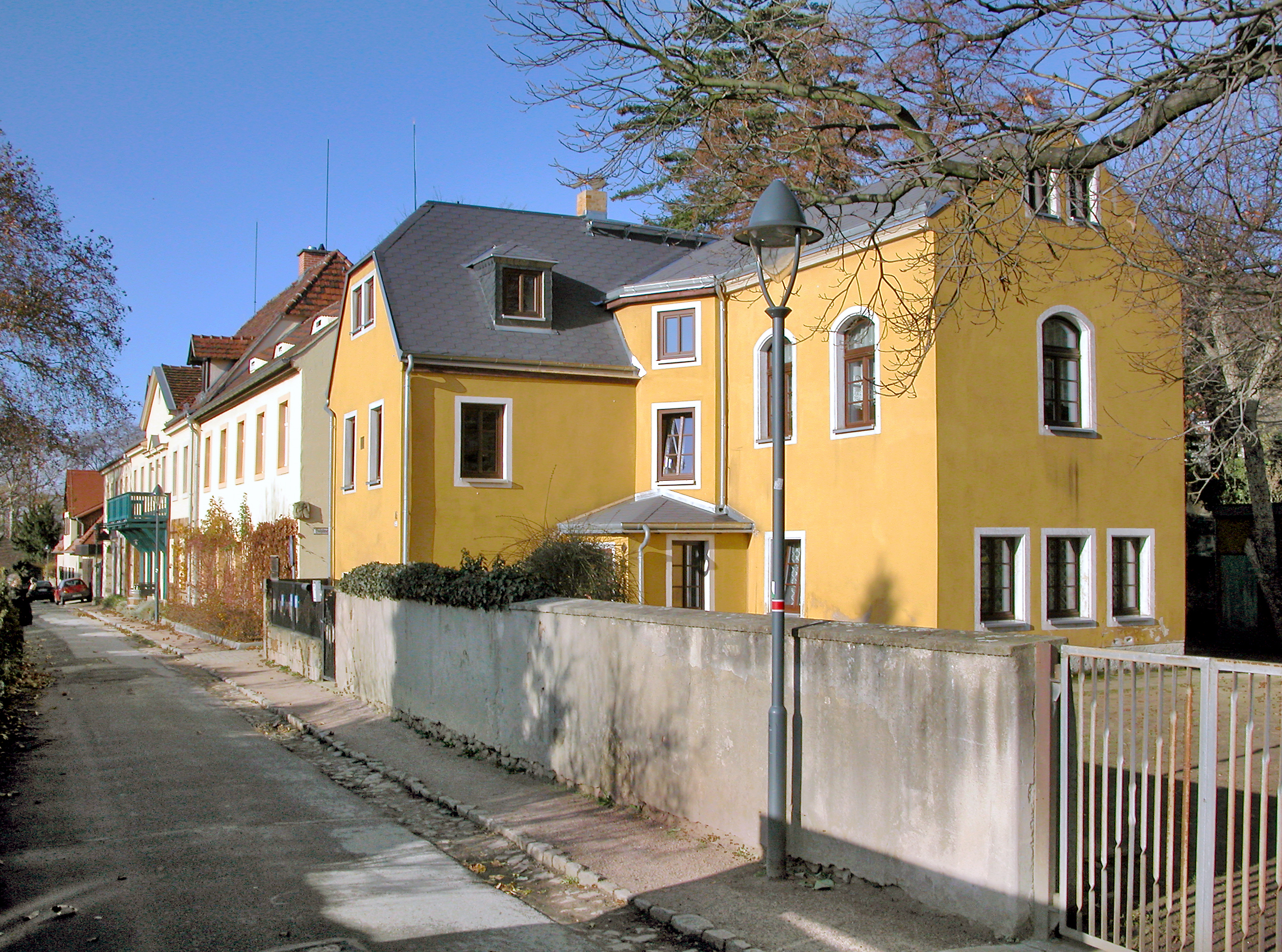 18.11.2009 01445 Radebeul-Oberlößnitz: Weingut Haus Friedeborn, Weinbergstraße 36 / Ecke Hohlweg. Dahinter Weinbergstraße 34/34A. Weingut "Drei Herren" (historisch Herrmannsberg). [DSCN40198.TIF]20091118100DR.JPG(c)Blobelt